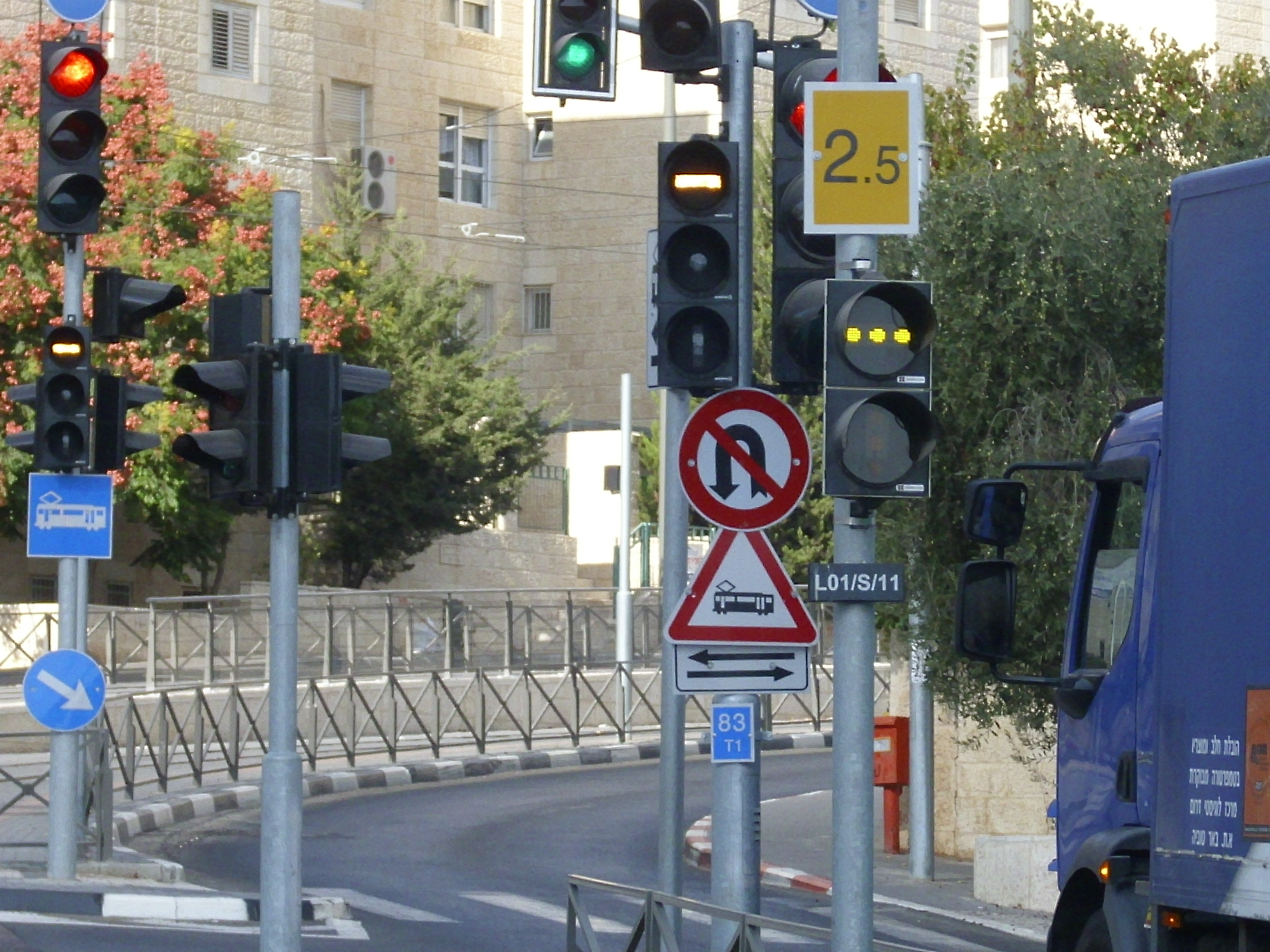 Lichtzeichen in Pisgat Ze'ev.